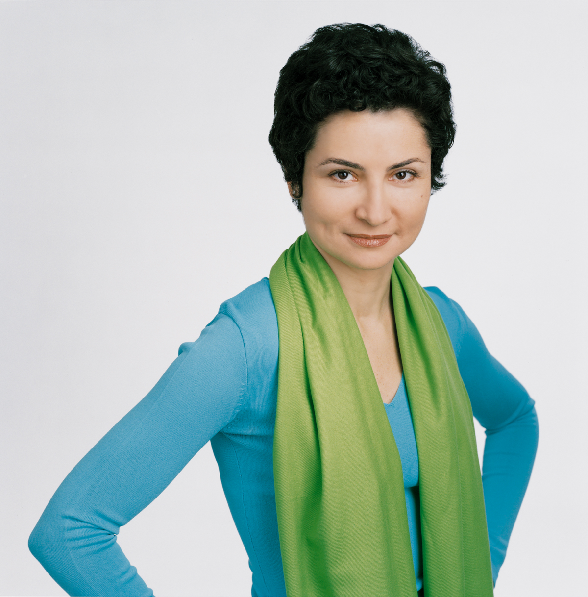 Alev Korun. Wiener Landtagsabgeordnete und Mitglied des Wiener Gemeinderats (Die Grünen)